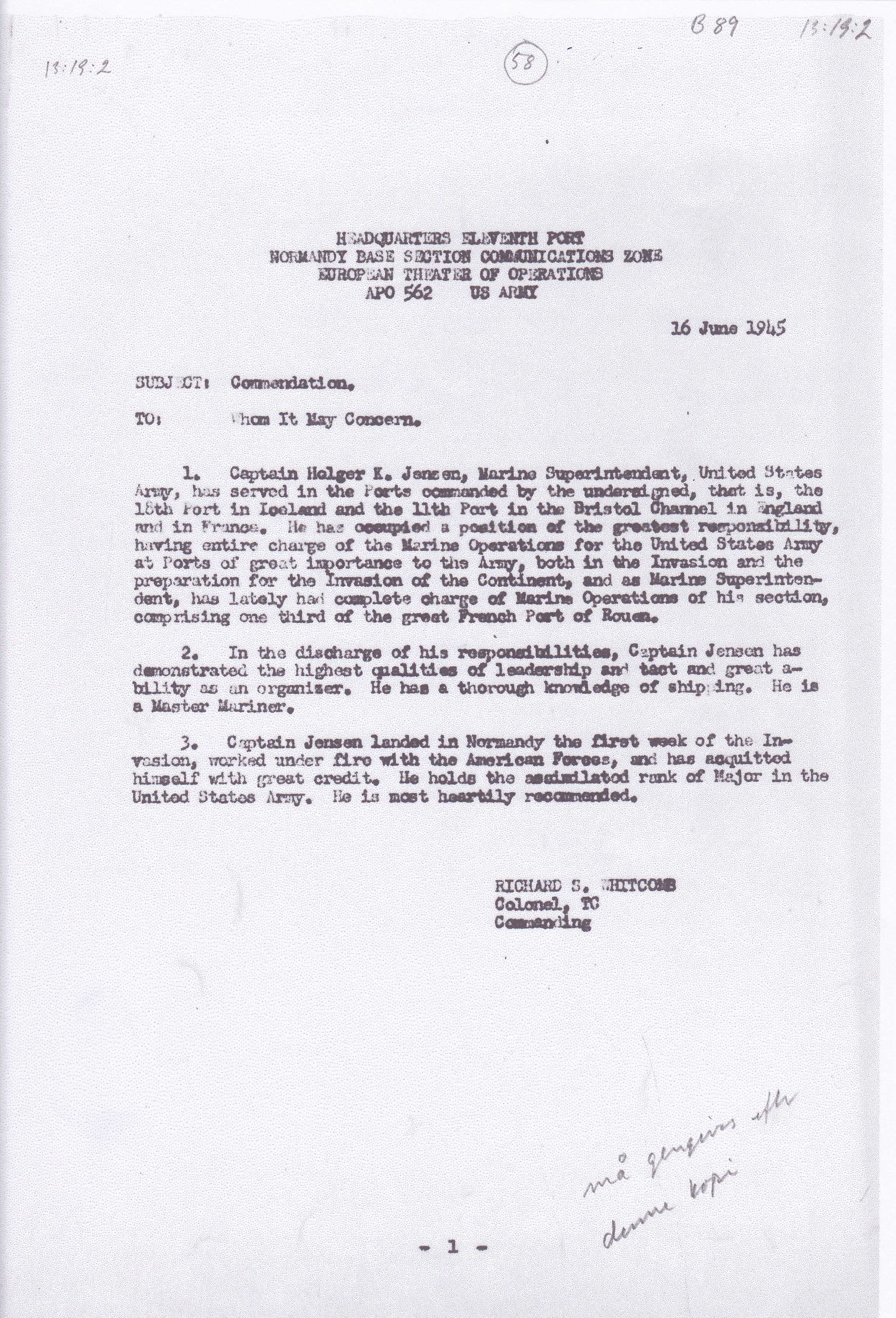 Anbefaling af Holger Jensen